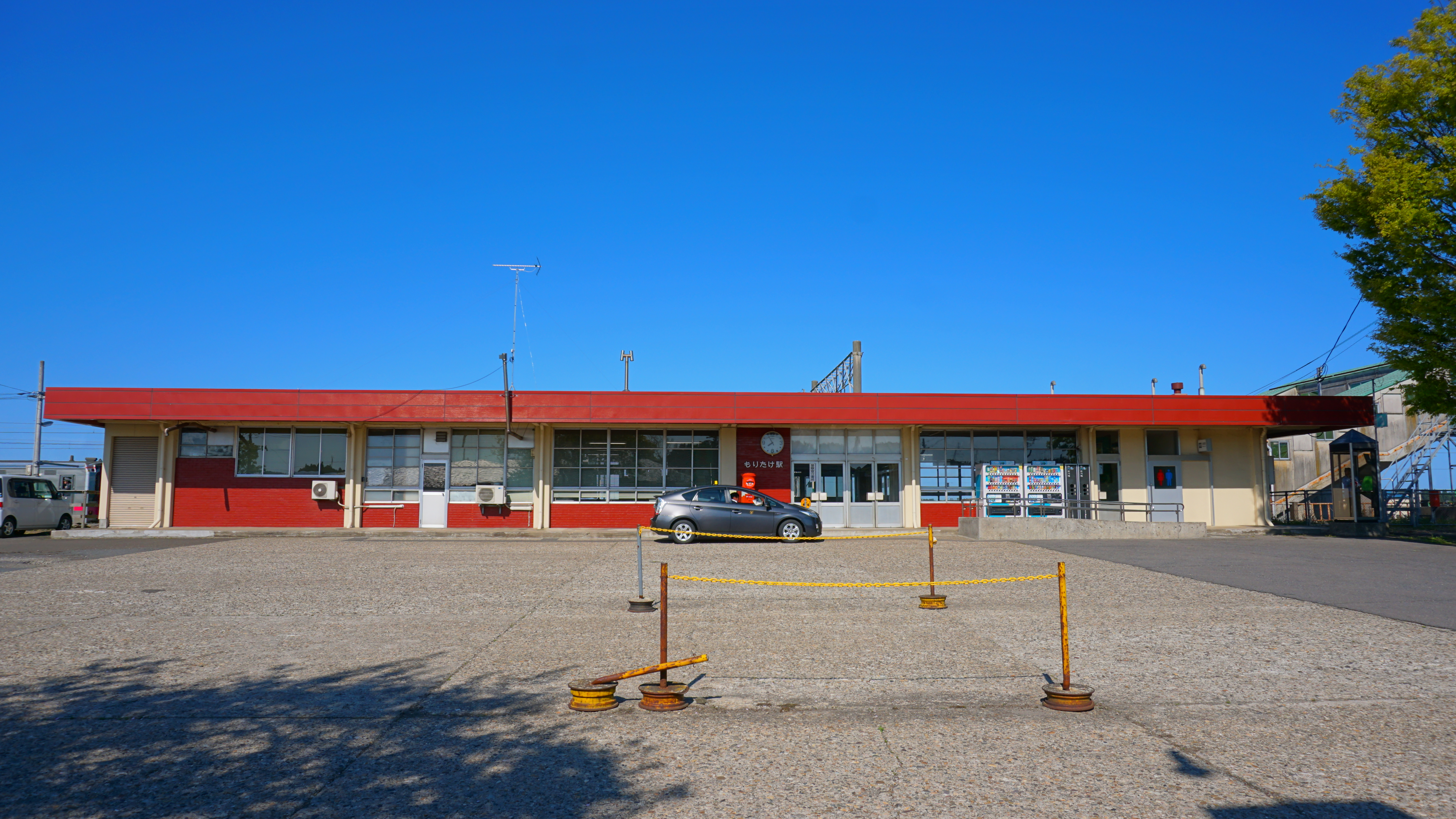 奥羽本線 森岳駅